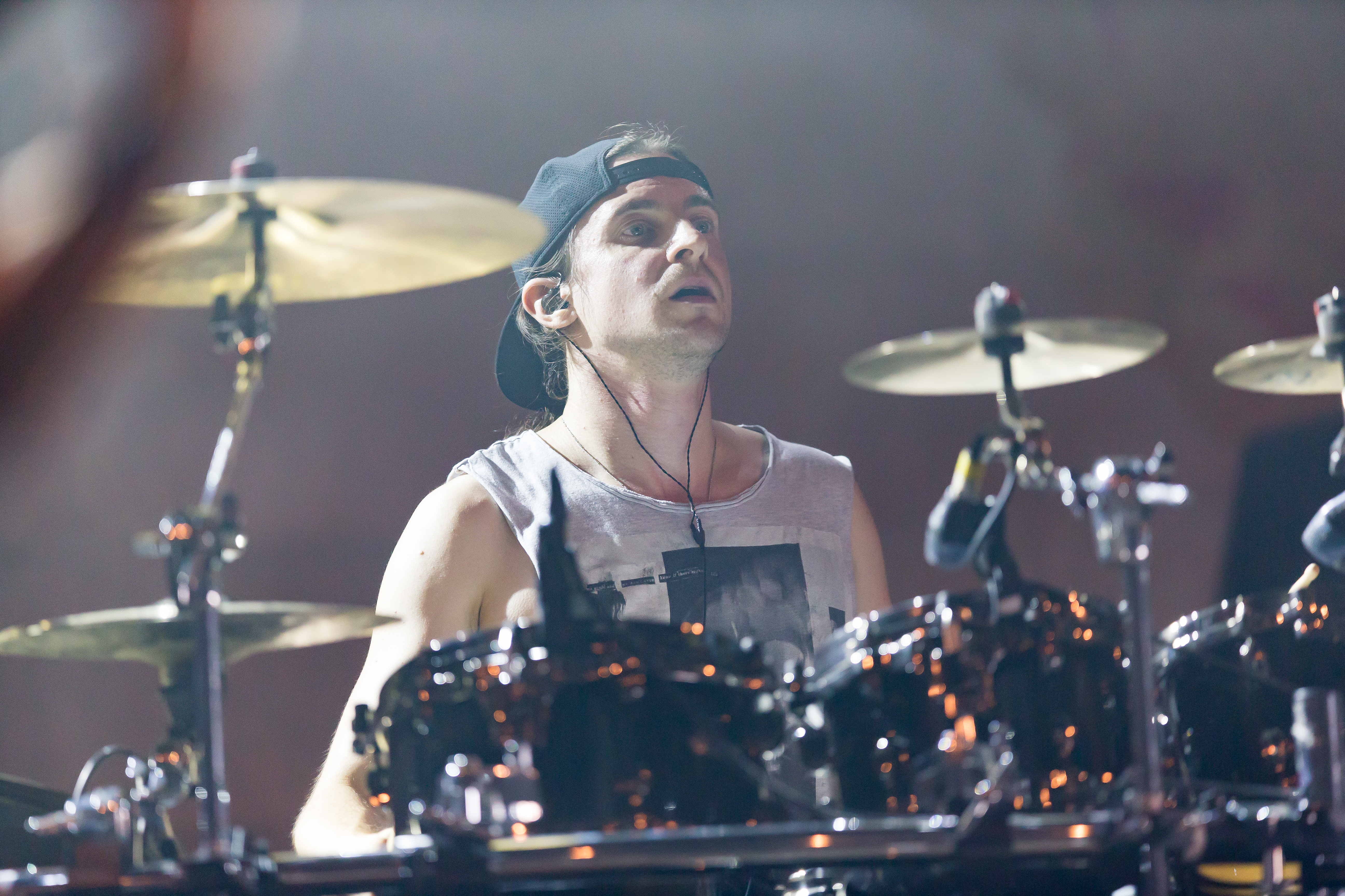 Obscura during Summer Breeze 2016 at , Dinkelsbühl, Bayern, Germany on 2016-08-19, Photo: Sven Mandel